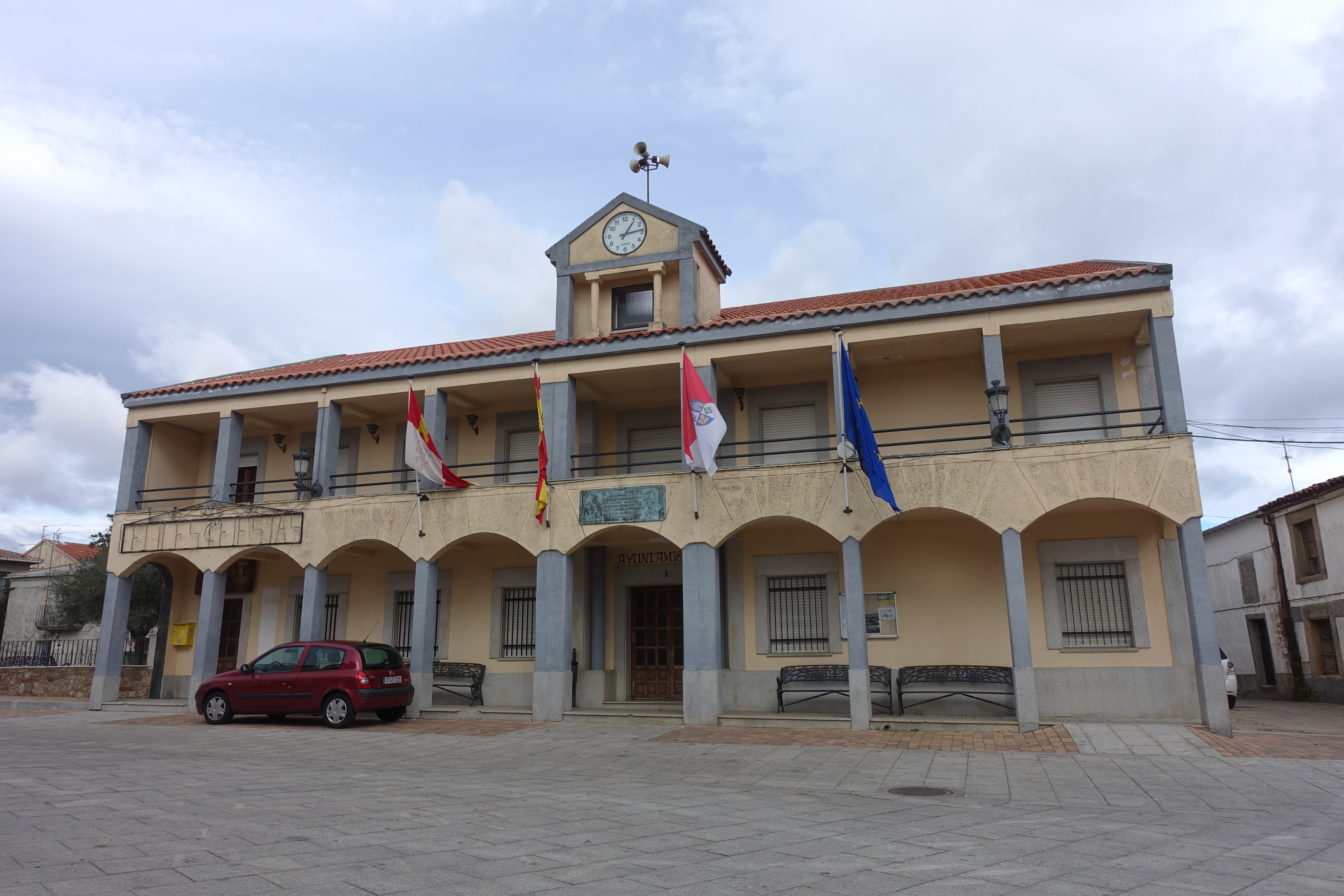 Casa consistorial de Navasfrías (Salamanca, España).